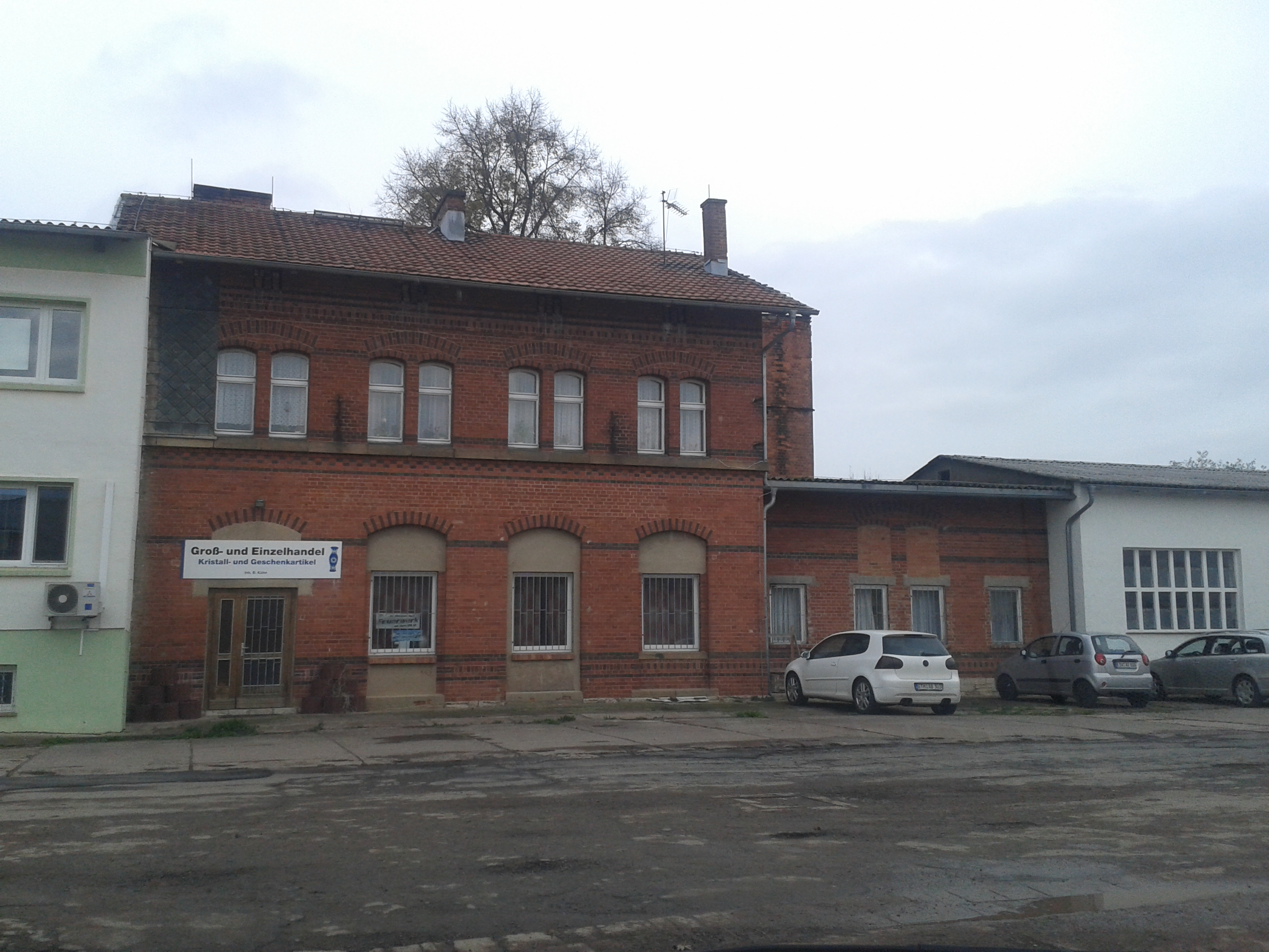 Das Gebäude des früheren Bahnhofs von Großenbehringen